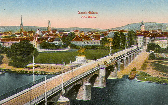 Saarbrücken, Alte Brücke mit Reiterstandbild Kaiser Wilhelm I.